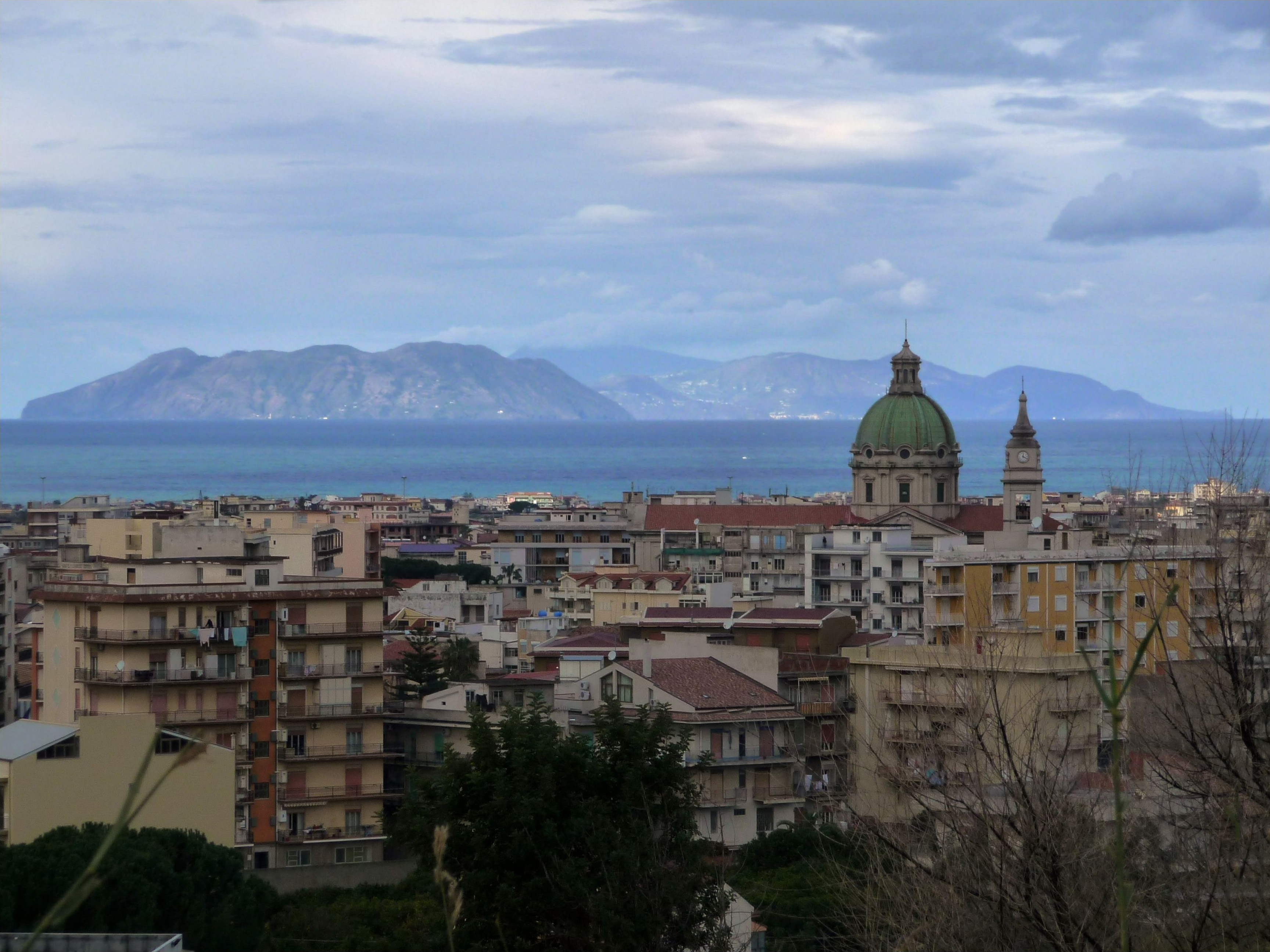 Panorama di Barcellona Pozzo di Gotto direzione nord (all'orizzonte le isole Eolie)